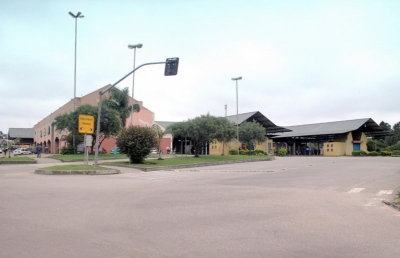 Terminal Rodoviário do município de Pinhais e Shopping Metropolitano Pinhais, na Grande Curitiba, PR.